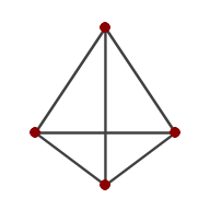 Exemple de graf planar